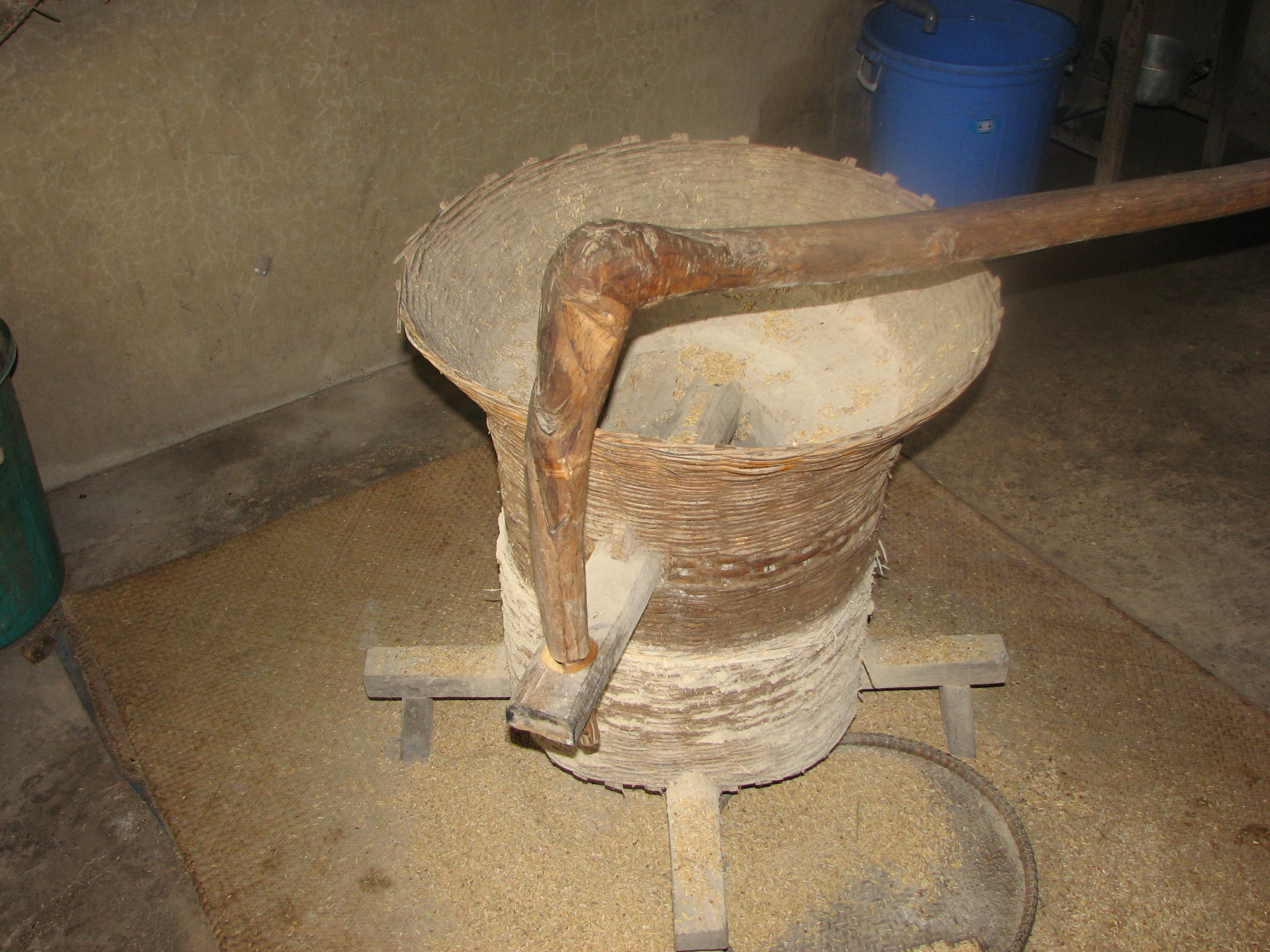 An old rice grinder in Vietnam.